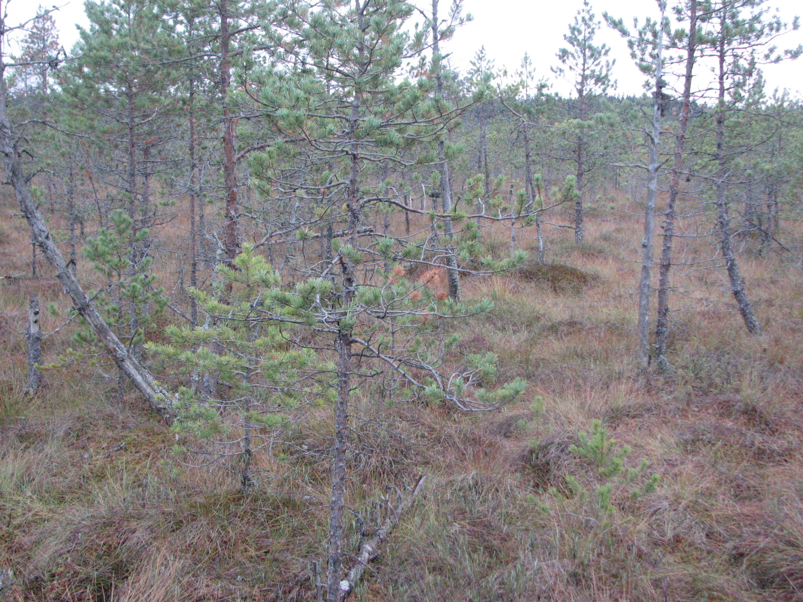 Valgesoo Landscape Reserve, Estonia